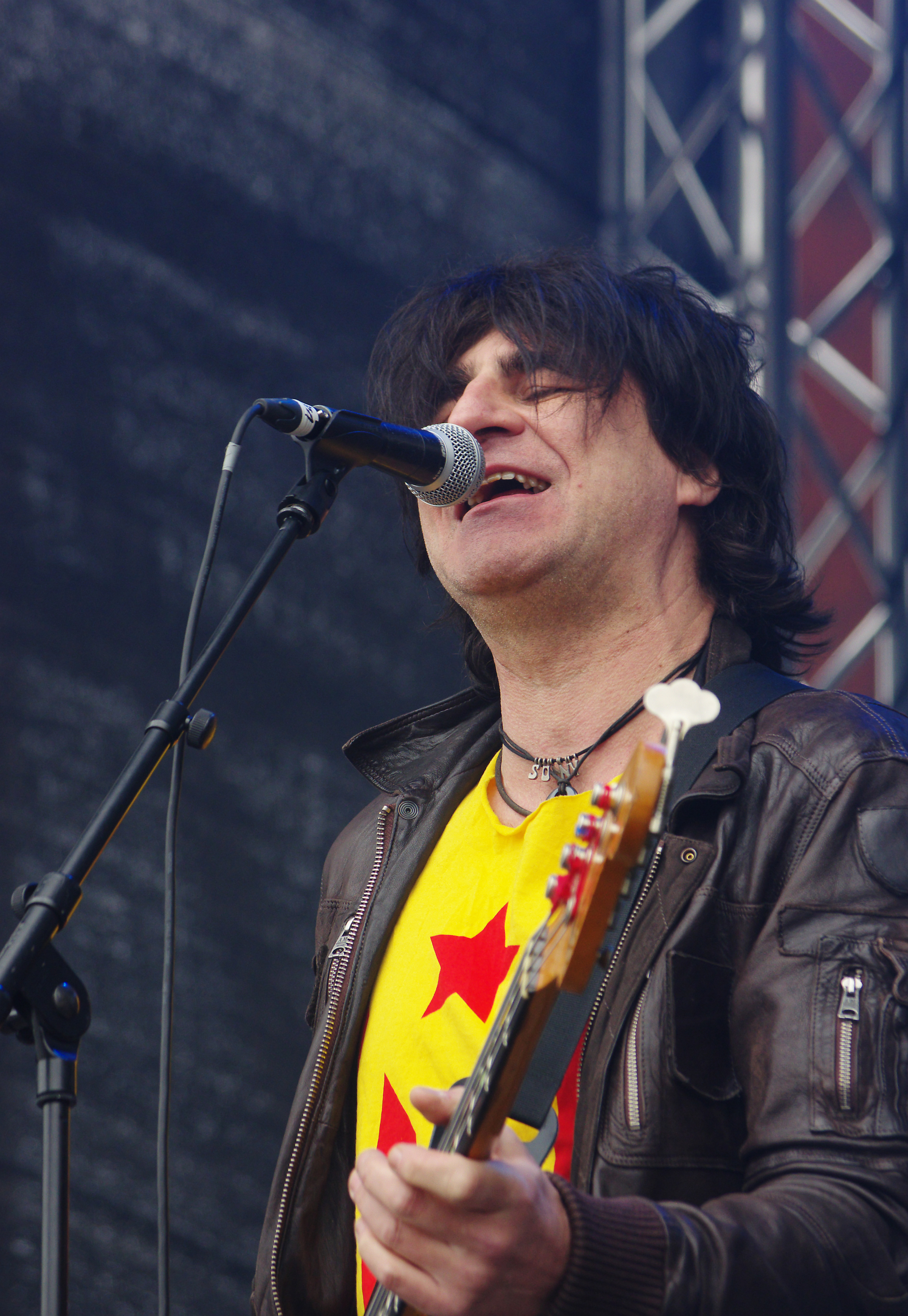 Chameleons Vox, Rock in den Ruinen 2013 in Dortmund. Mark Burgess (voc, bass)